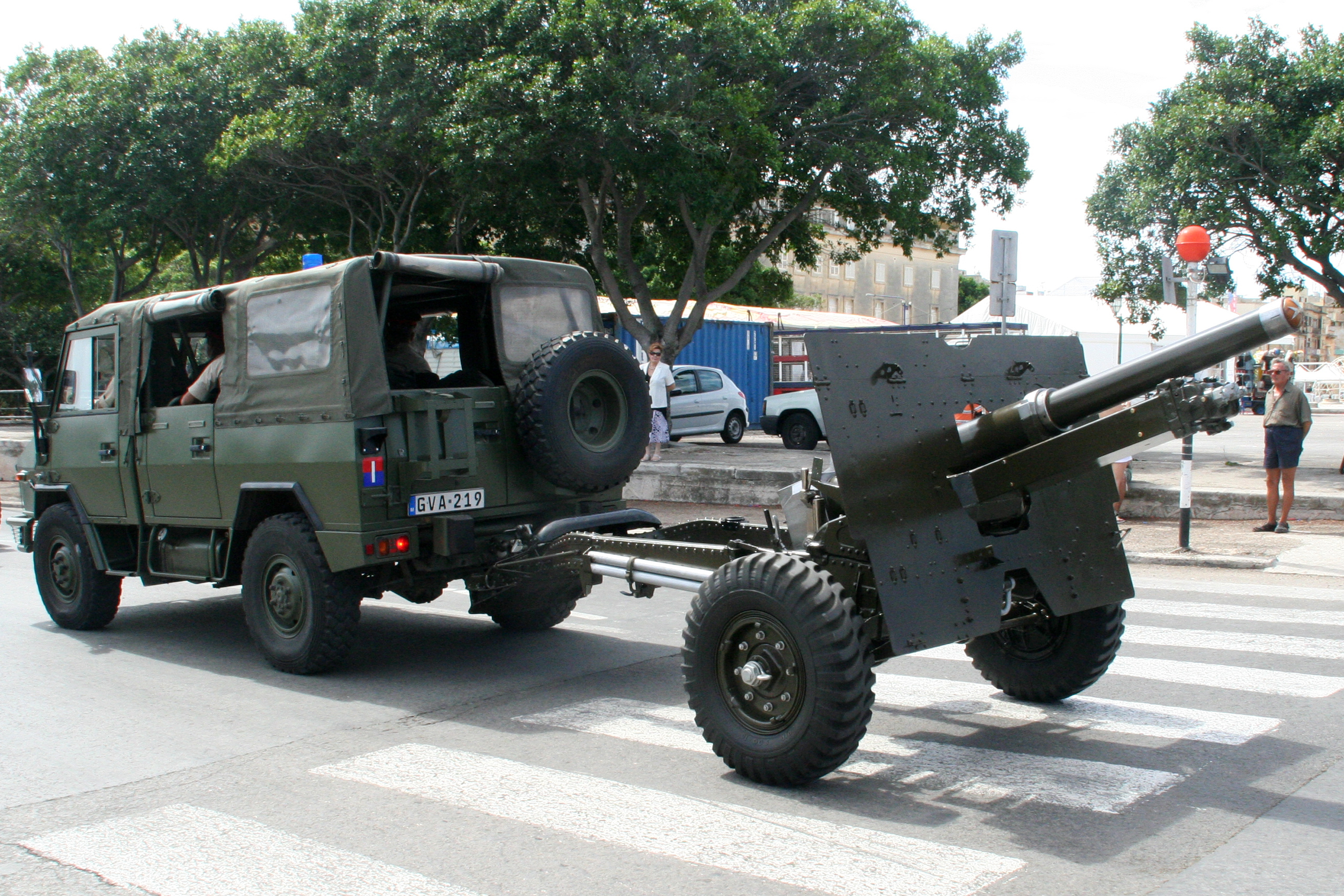 véhicule de l'armée maltaise tractant un canon